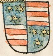 Erb Celjských